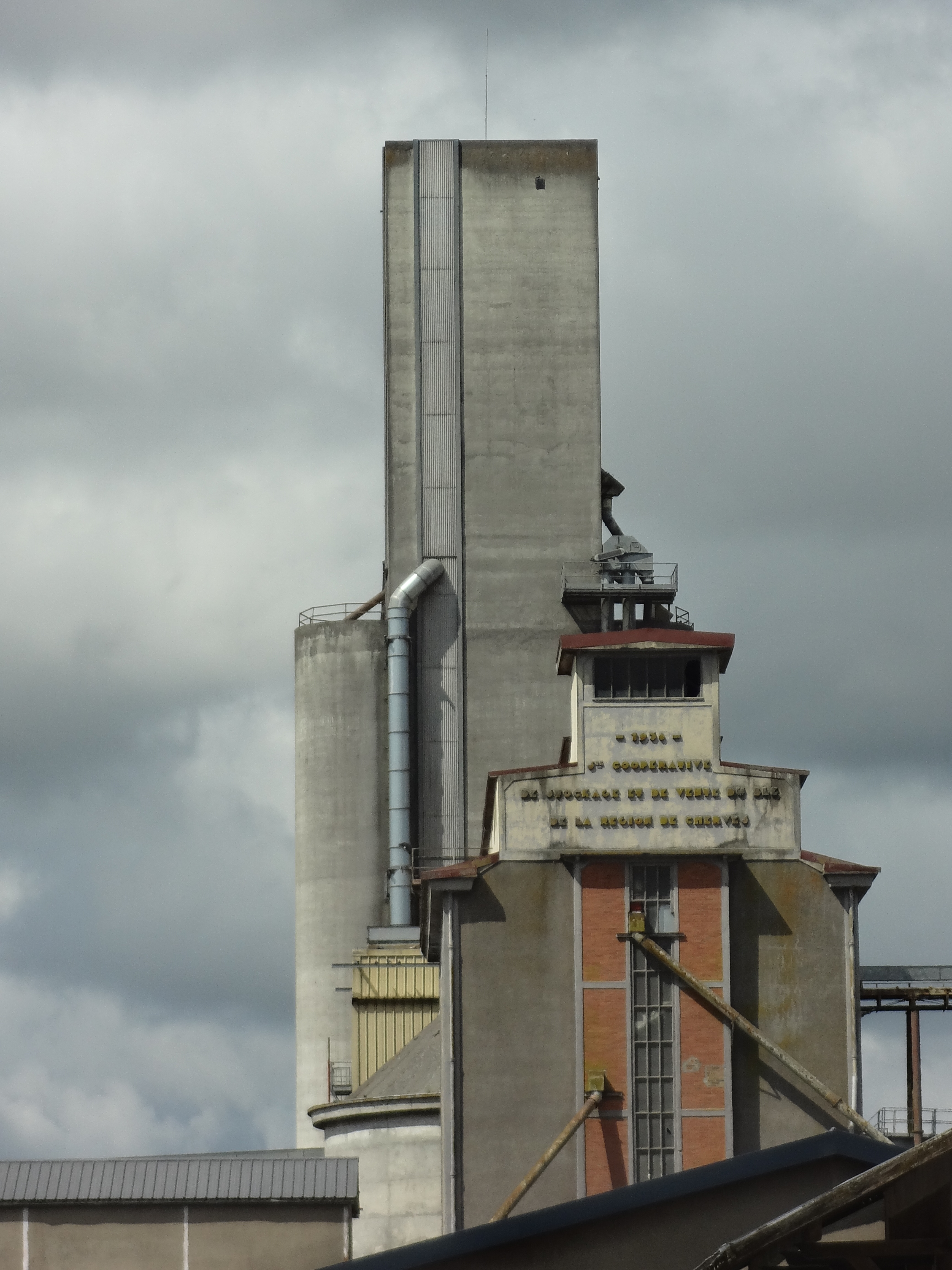 Silos anciens et modernes de la coopérative céréalière de Cherves à Chalandray